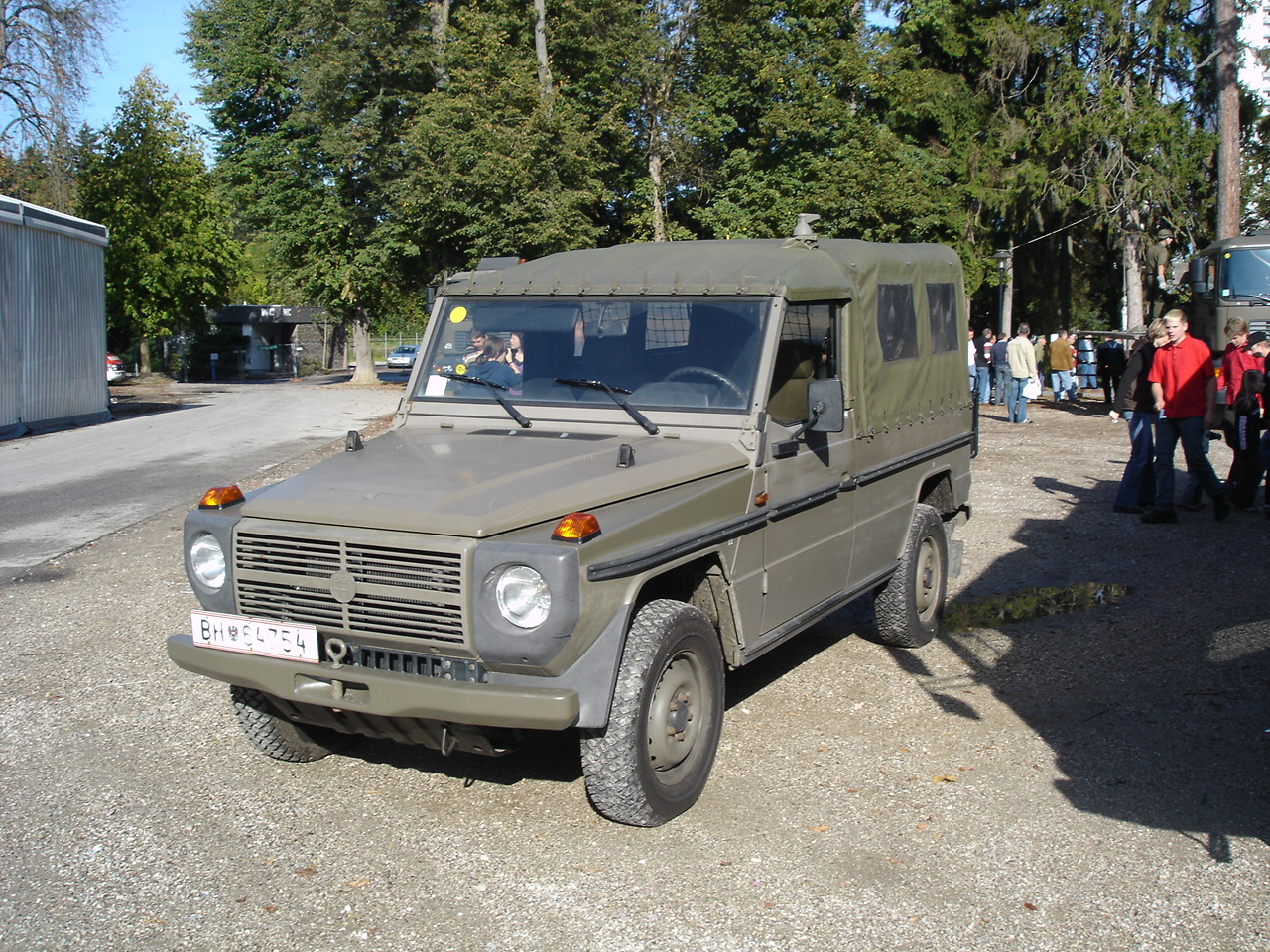 Puch G des österreichische Bundesheeres